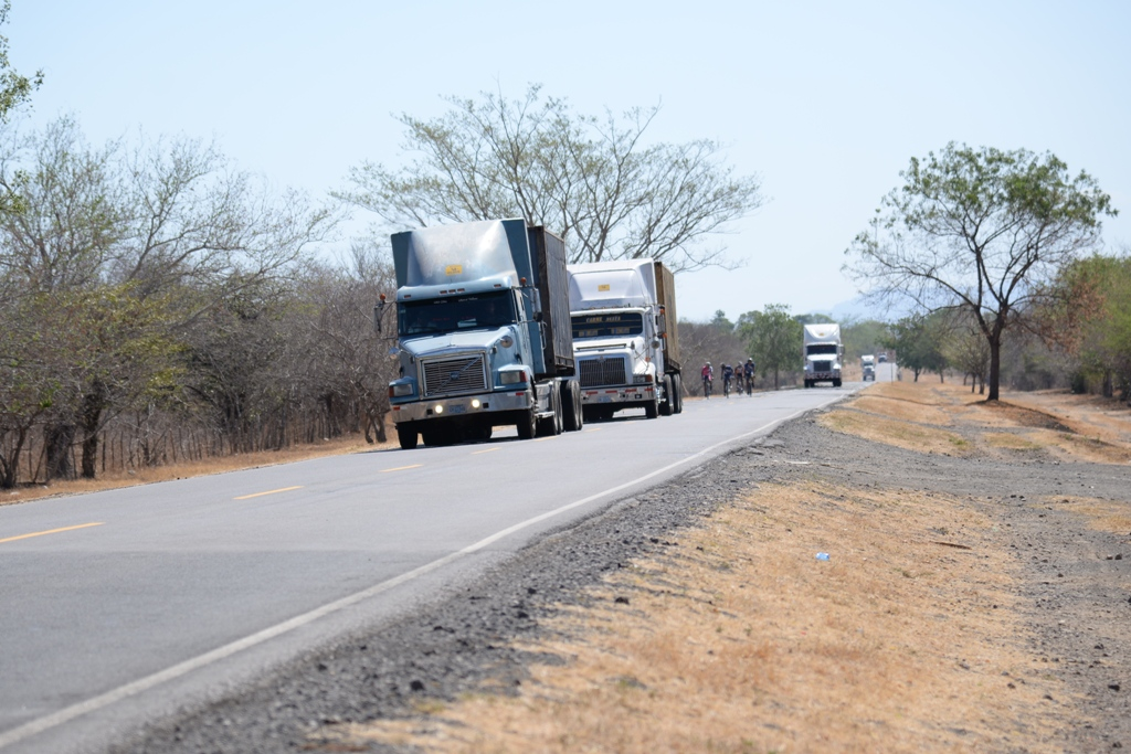 Camiones en la carretera entre León y Matagalpa, en el municipio de Larreynaga, Nicaragua.